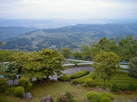 山頂から大井川方面の展望